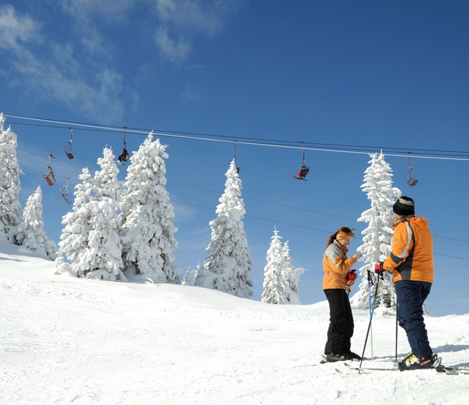 Скијање на Јахорини